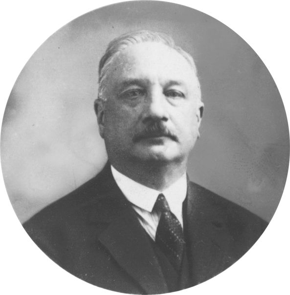 Prof. Ir. H. ter Meulen is op 4 augustus 1930 25 jaar verbonden als hoogleraar aan de Technische Hogeschool Delft